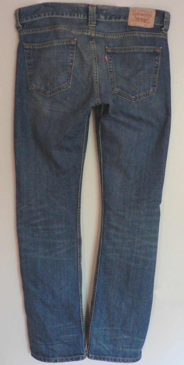 Levi's 506 jeans